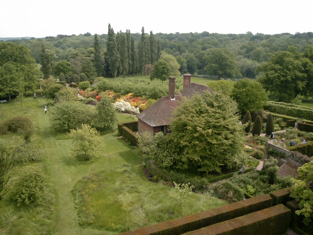 Beschreibung: Sissinghurst Castle Garden - Blick vom Turm in Richtung Südost Quelle: eigene Fotografie Datum: Mai 2004 Fotograf: OdI andere Versionen: keine